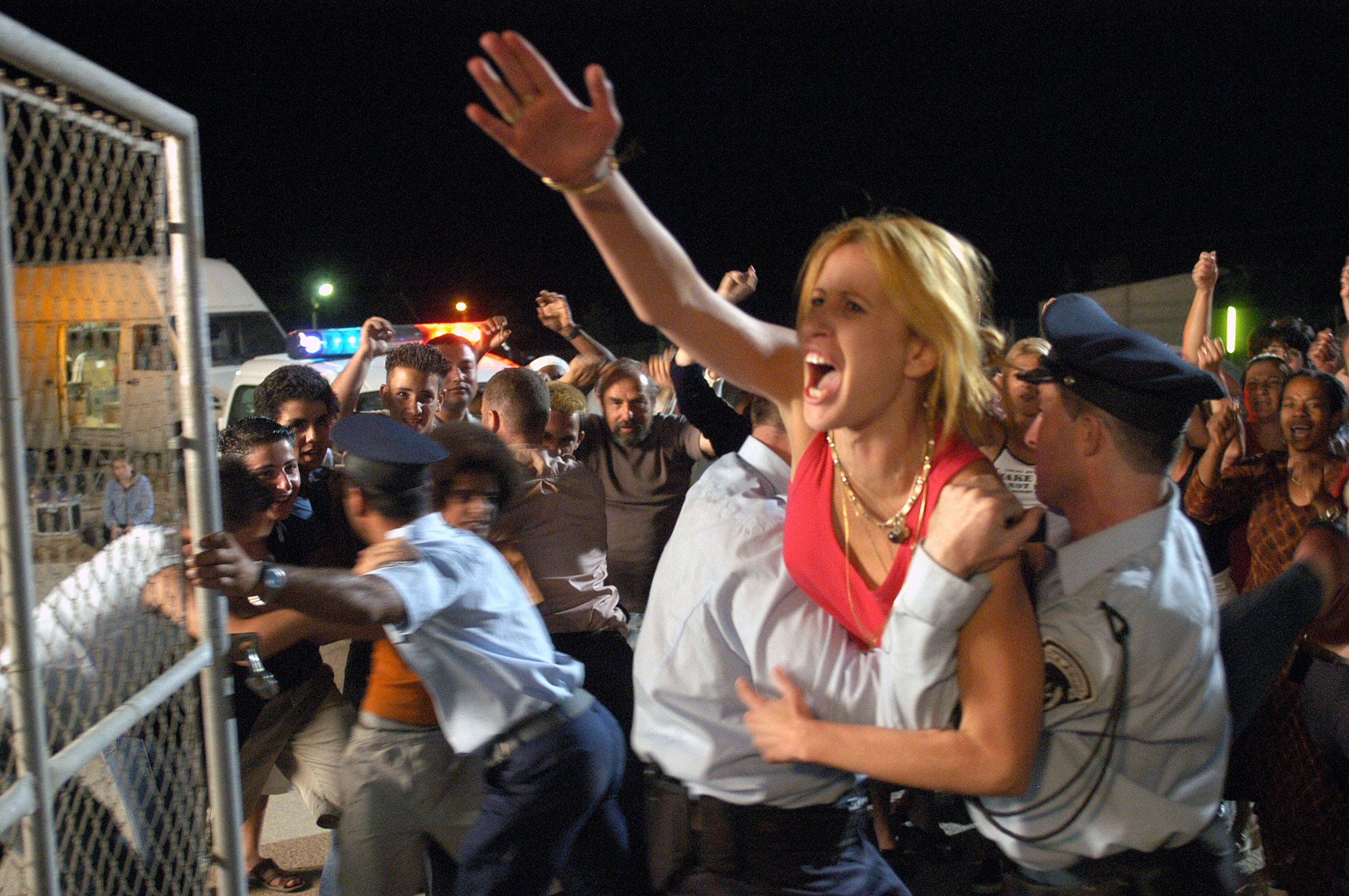 מתוך סרטו של ינקול גולדווסר "אין לה אלוהים", 2006